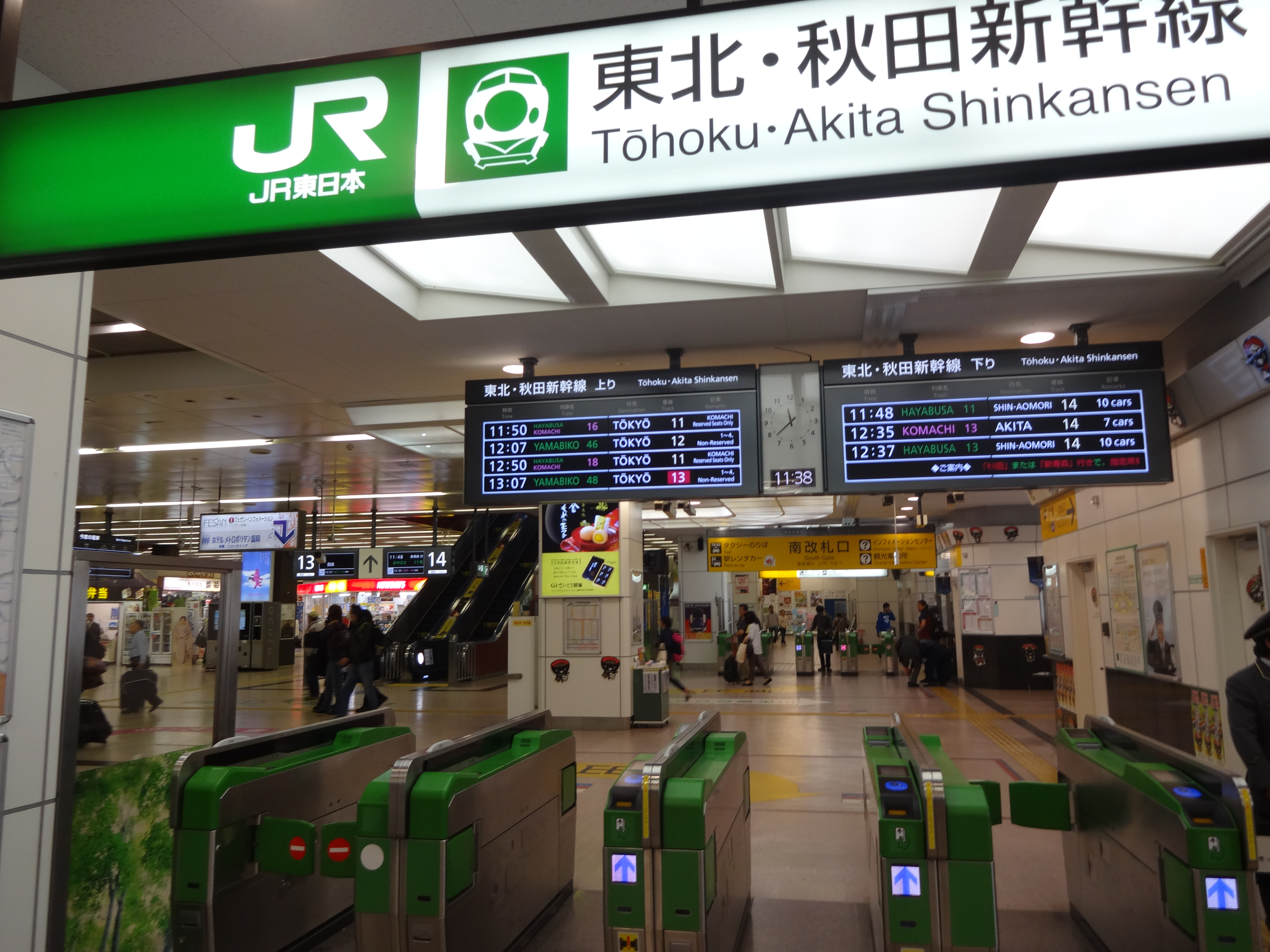 盛岡駅新幹線改札口